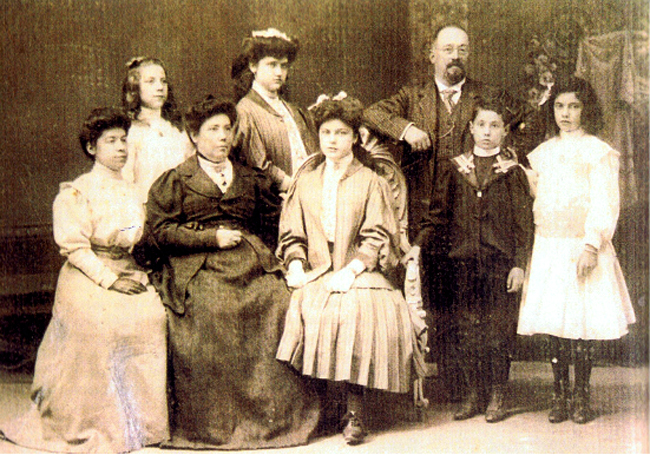 Foto familiar del Dr Modest Furest